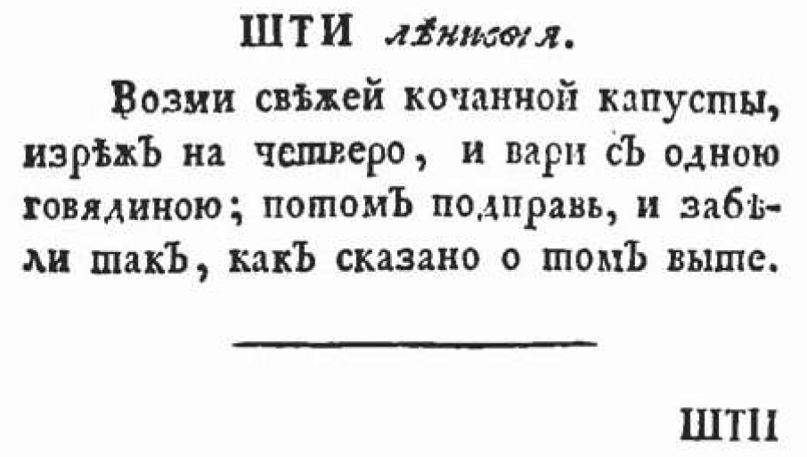 Часть листа книги Н. П. Осипова «Старинная русская хозяйка, ключница и стряпуха; или подробное наставление о приготовлении настоящих старинных российских кушаний, заедок и напитков; о различных предметах, касающихся до хозяйства; о сбережении и заготовлении впрок всяких припасов по самому старинному российскому обычаю и вкусу». — СПб, 1790.